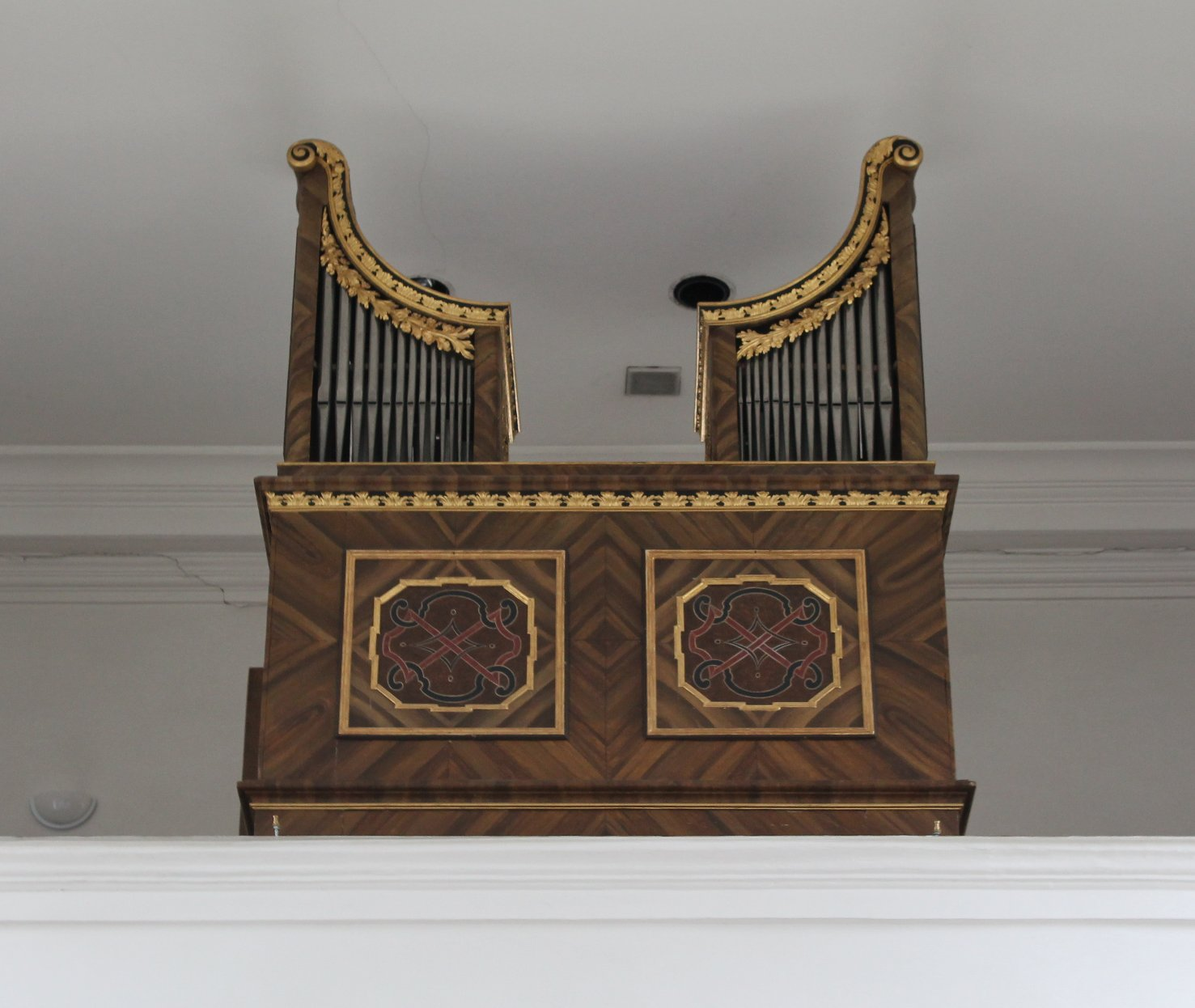 Die Orgel der Karolinenkirche in Großkarolinenfeld (1738, Q. Weber, I/8; 1824 nach Großkarolinenfeld)